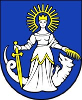 Městský znak Púchova na Slovensku